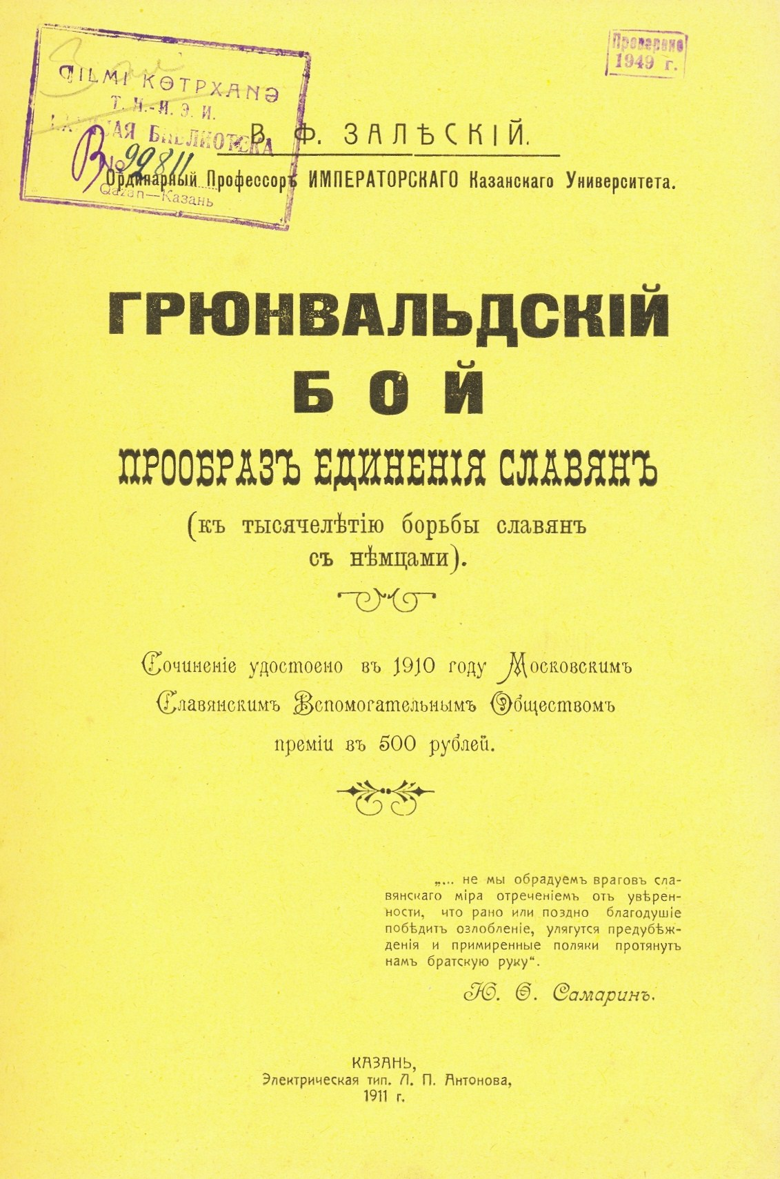 Обложка книги: Залеский В.Ф. Грюнвальдский бой - прообраз единения славян (к тысячелетию борьбы славян с немцами). - Казань: Электрическая типография Л.П.Антонова, 1911.